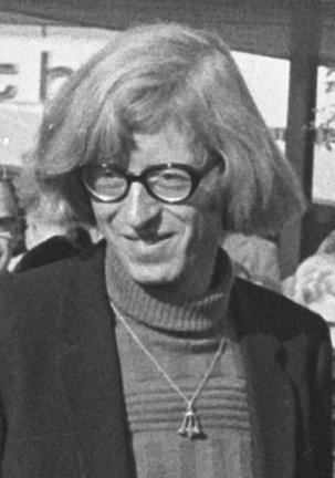 Collectie / Archief : Fotocollectie Anefo Reportage / Serie : Onthulling speelplastiek van beeldhouwer Renze Hettema op Gulden Winckelplantsoen Beschrijving : Wethouder Lammers (tweede van rechts) met Renze Hettema (derde van rechts) Datum : 27 oktober 1973 Locatie : Amsterdam, Noord-Holland Trefwoorden : beeldhouwers, onthullingen, speelplastieken, wethouders Persoonsnaam : Hettema, Renze, Lammers, Han Fotograaf : Fotograaf Onbekend / Anefo Auteursrechthebbende : Nationaal Archief Materiaalsoort : Negatief (zwart/wit) Nummer archiefinventaris : bekijk toegang 2.24.01.05 Bestanddeelnummer : 926-7856